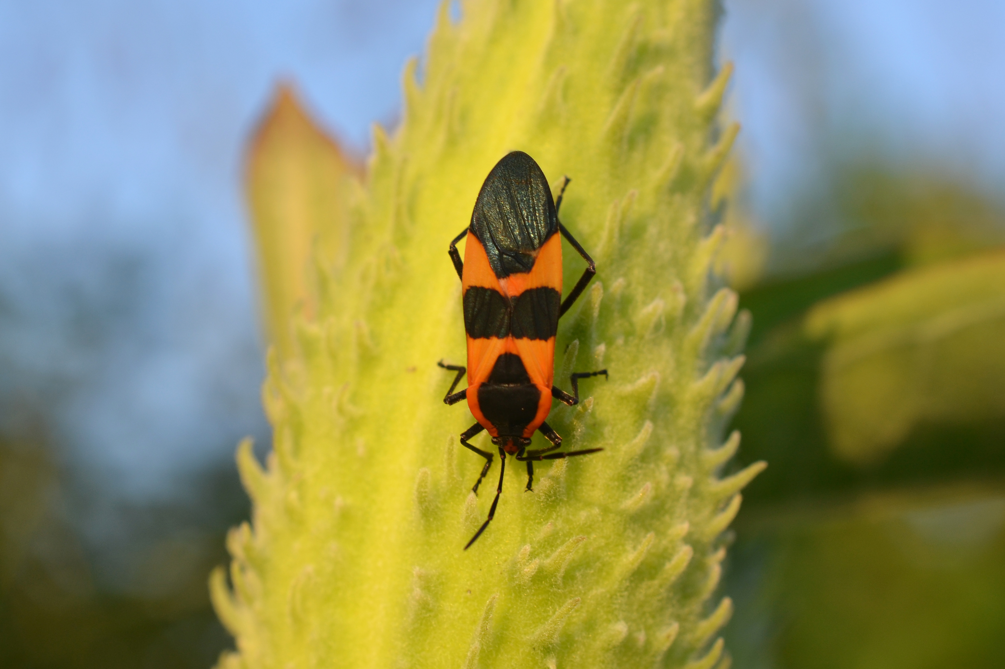 Rentschler Forest Metropark, Fairfield, Ohio